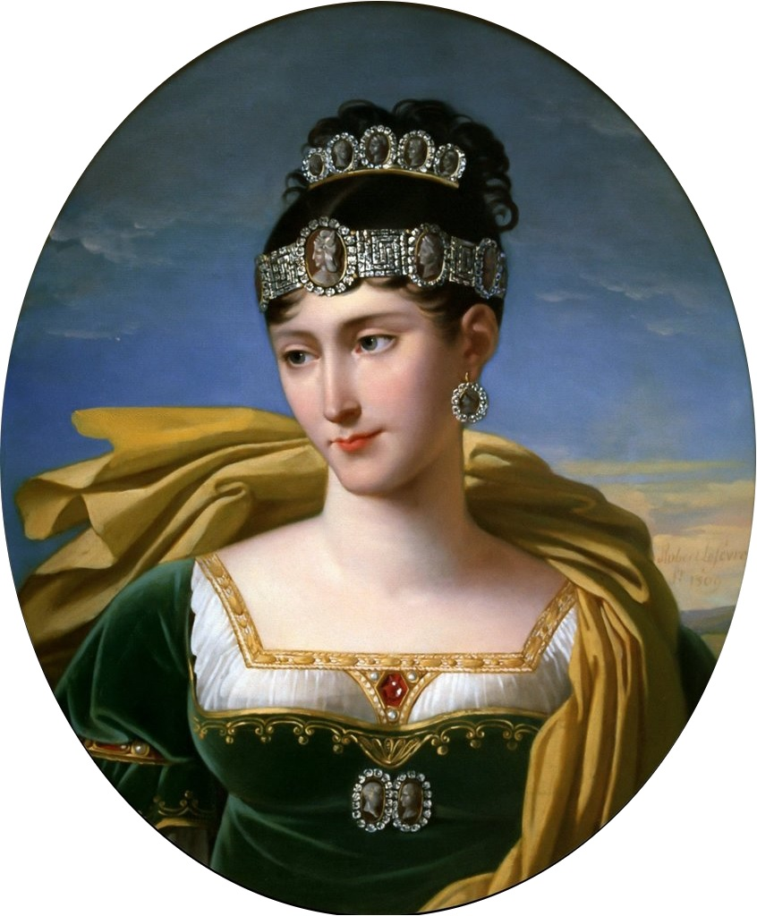 Porträt Pauline Bonapartes